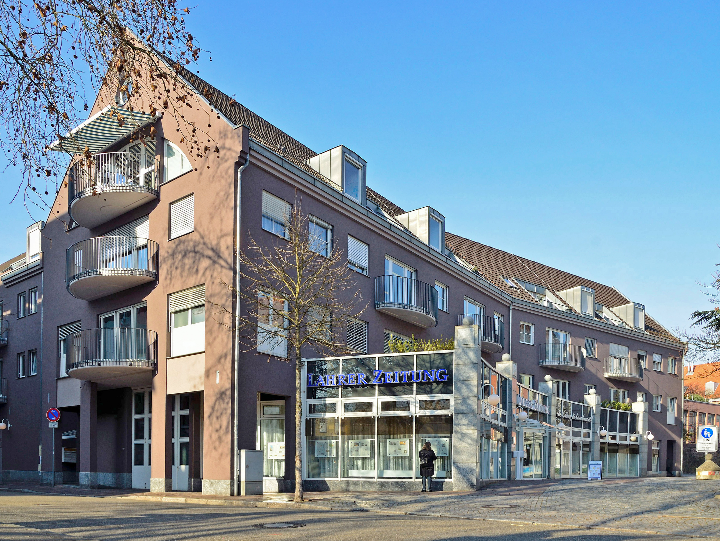 Das Walpotenhaus, ein Ärzte- und Geschäftshaus in der Innenstadt von Lahr, beherbergt Verlag und Geschäftsstelle der Lahrer Zeitung.